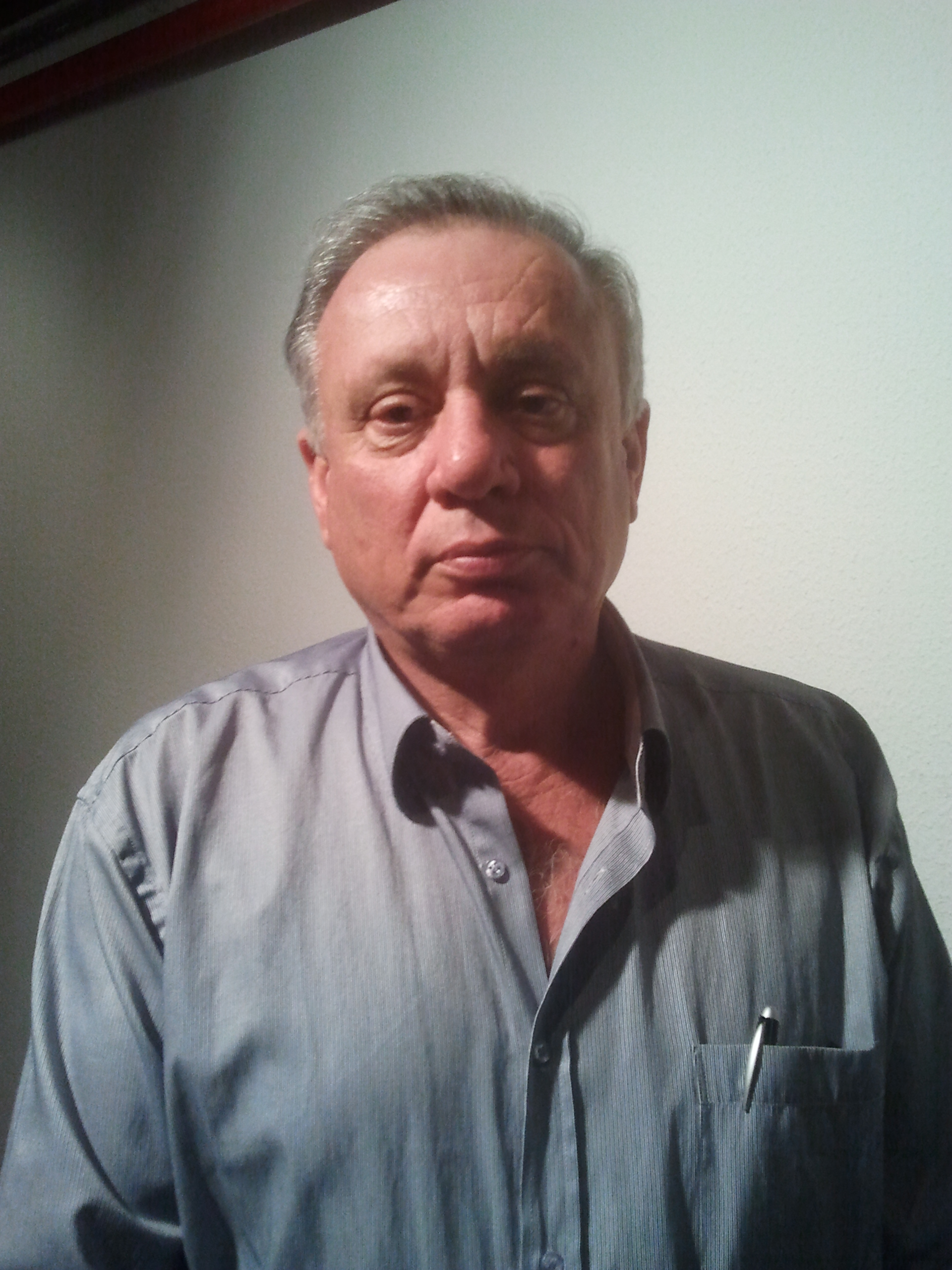 איתן ברושי מזכיר התנועה הקיבוצית